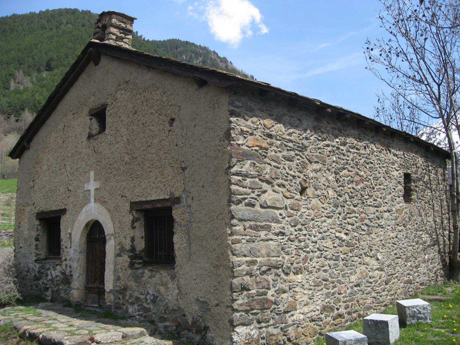 Church: Sant Pere del Serrat